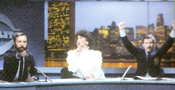 Raúl Portal, Virginia Hanglin y Raúl Becerra conducen el programa "Semanario Insólito" en 1982.